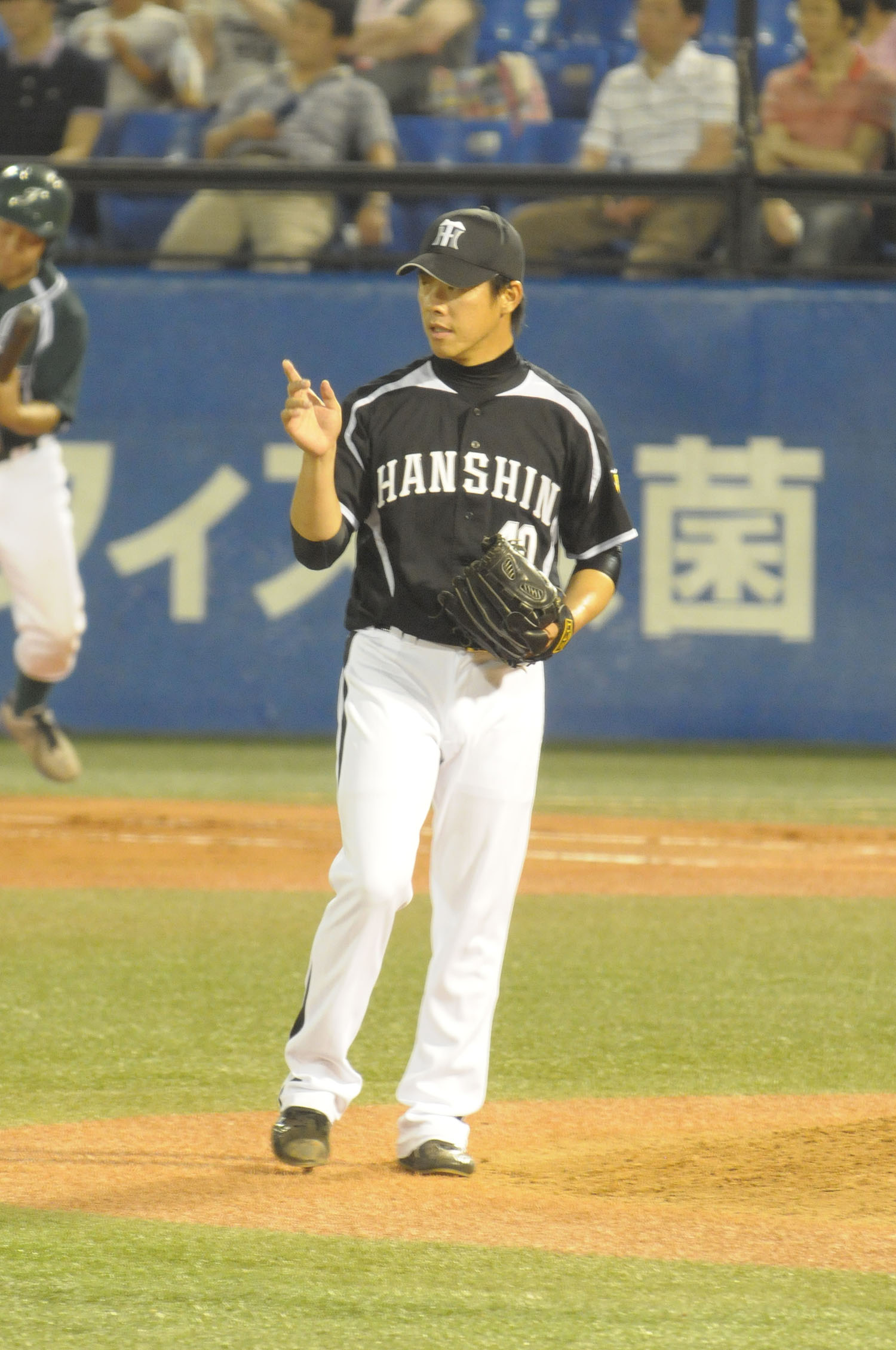 阪神タイガース、鄭凱文選手。神宮球場で。